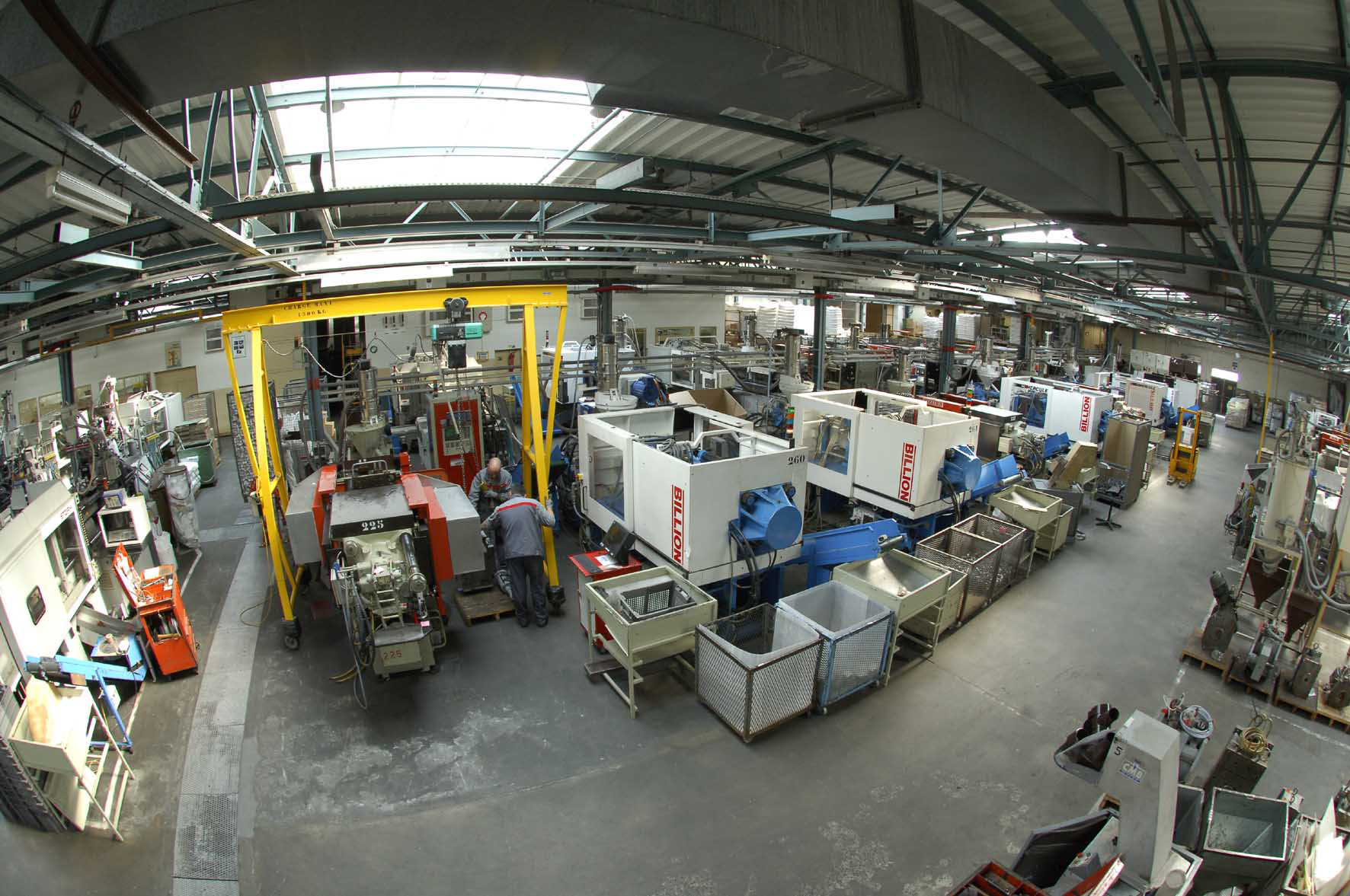 Presses à injecter dans une usine Nicoll